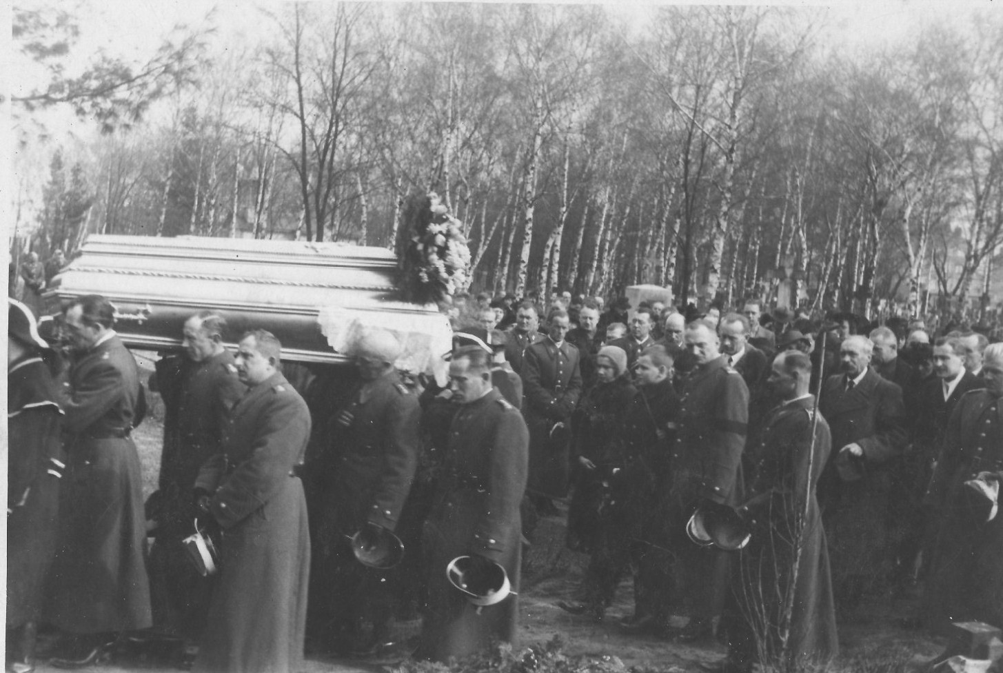 Pogrzeb Janiny Országh Mączewskiej